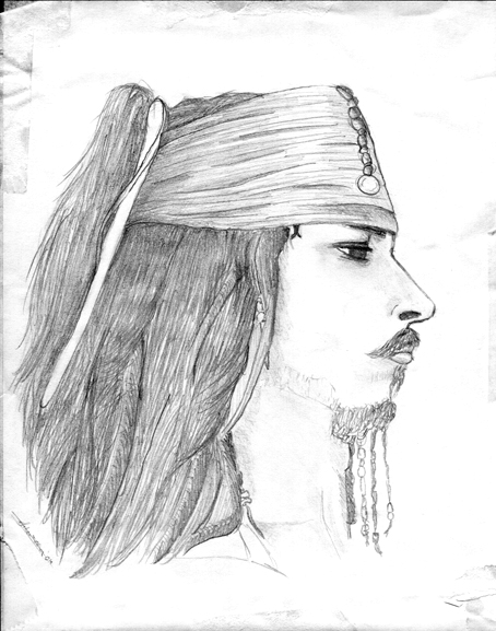 Jack Sparrow's head - drawing (portrait). Orginal description: 2004. No se le parece, lo sé, pero tenía ganas de dibujar la cinta de la frente y el pelo.